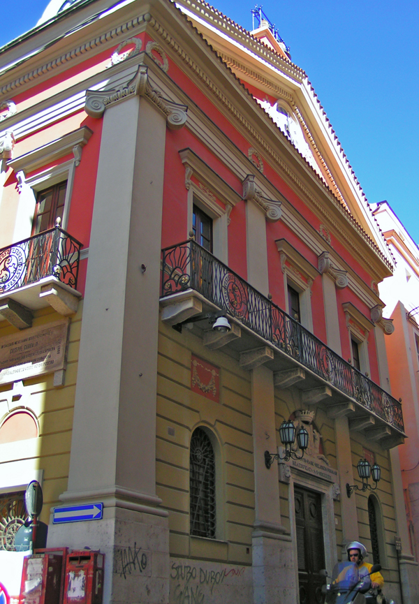 Teatro civico. Il teatro civico, antico palazzo di città di Sassari, dove si svolge la cerimonia dell'Intregu. Facciata su corso Vittorio Emanuele. Palazzo di città.